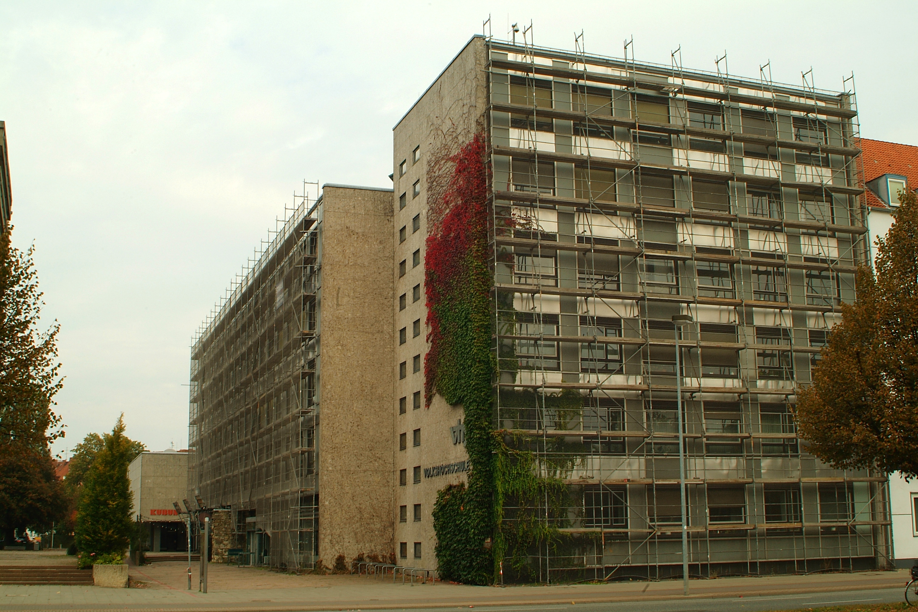 Eingang der Ada-und-Theodor-Lessing-Volkshochschule in Hannover während einer Einrüstung zur Fassaden-Sanierung; Blick vom Friedrichswall über die Schmalseite des Theodor-Lessing-Platzes zur Städtischen Galerie KUBUS